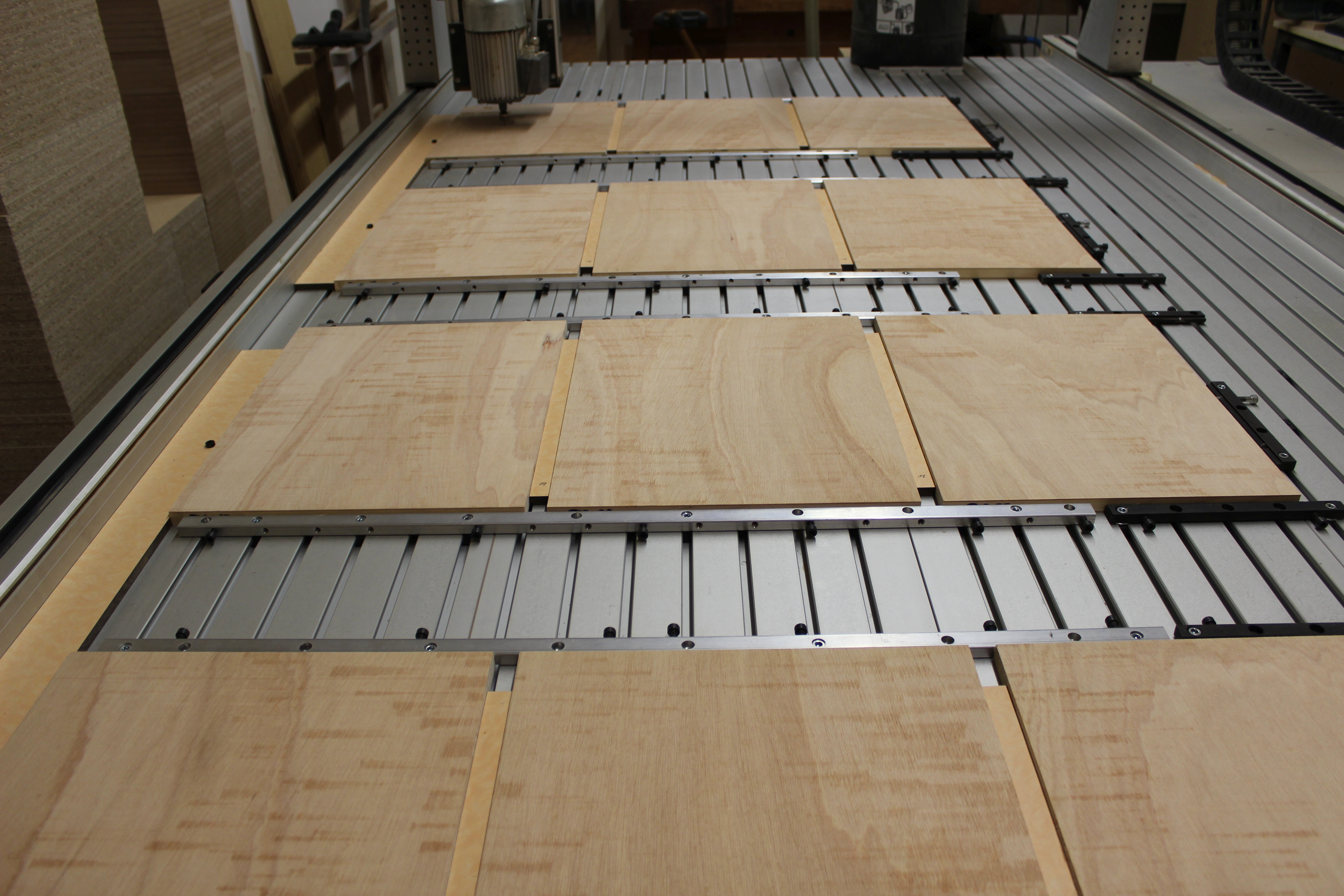 Das Bild zeigt eine CNC-Maschine während der Bearbeitung einer Holzplatte für einen 10-Farben-Holzschnitt. Hier werden gleichzeitig 12 Druckstöcke bearbeitet.